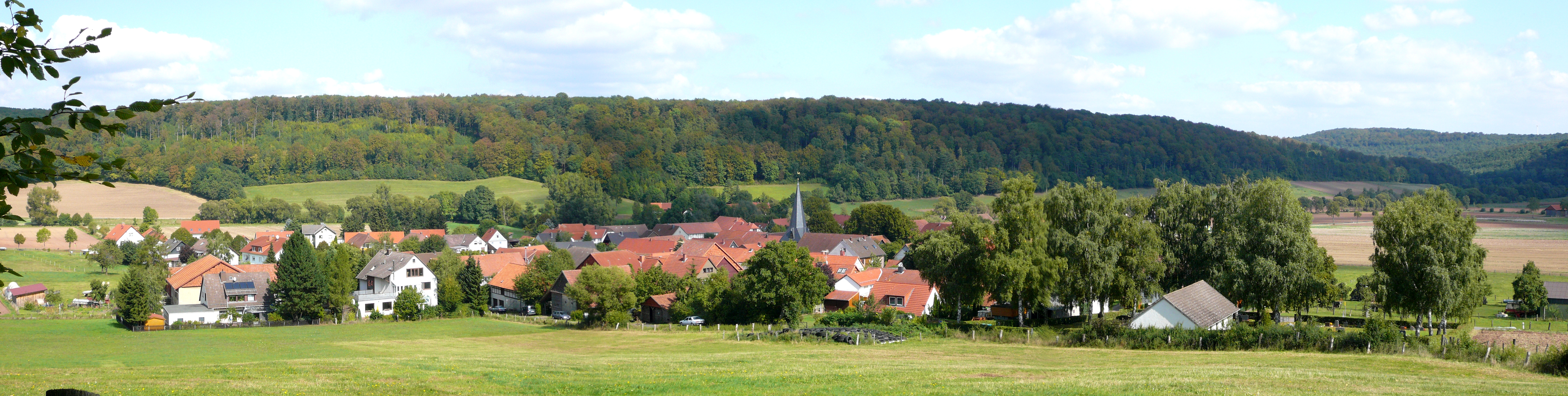 Blick von Südwesten vom Hang des Steinbergs auf Barlissen, Gemeinde Jühnde, Südniedersachsen. Im Hintergrund die Emme